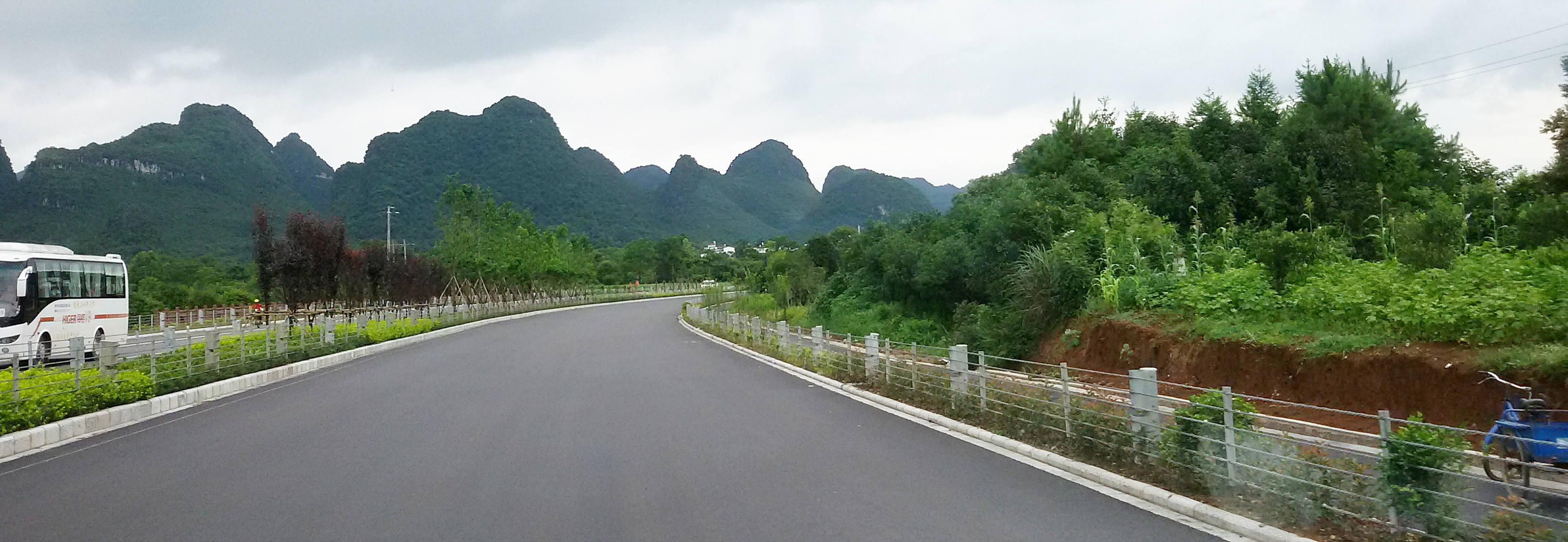 粵語: 321國道嘅陽朔縣二塘鎮附近